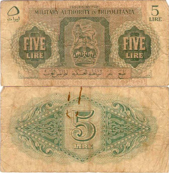 5 Tripolitanian lira note